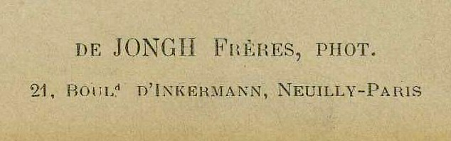 Signature commerciale des photographies de l'atelier photographique DE Jongh frères (1879-1904) à Neuilly-sur-Seine (Hauts-de-Seine, France). Détail d'un document original.